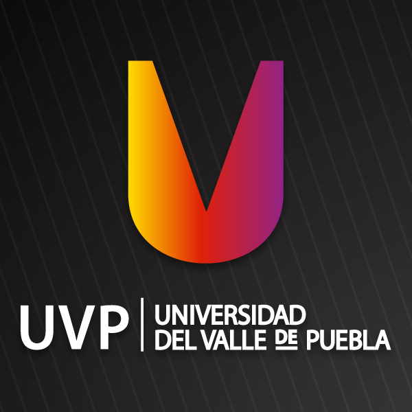 Logotipo de la Universidad del Valle de Puebla